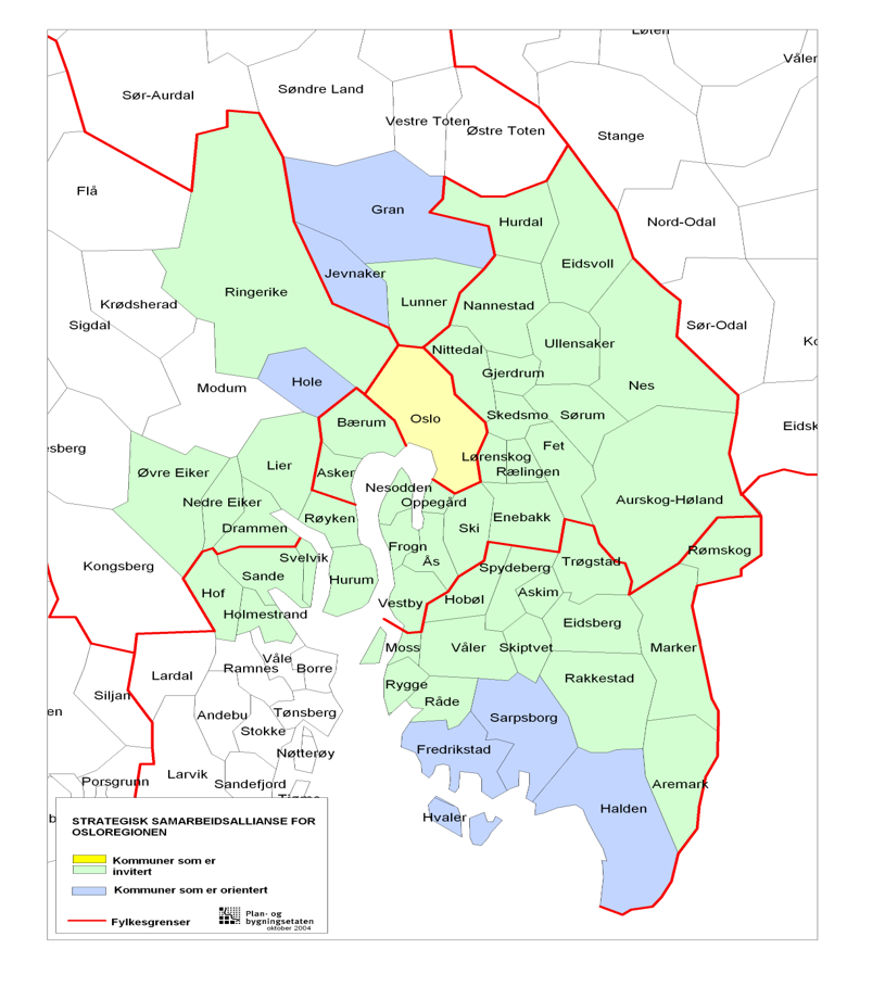 Kart fra Olsoregionens sekretariat, fra september 2006. Kartet viser en funksjonell inndeling av Osloregionen etter kommuner som er invitert eller orientert med Osloregionens samarbeidsallianse.